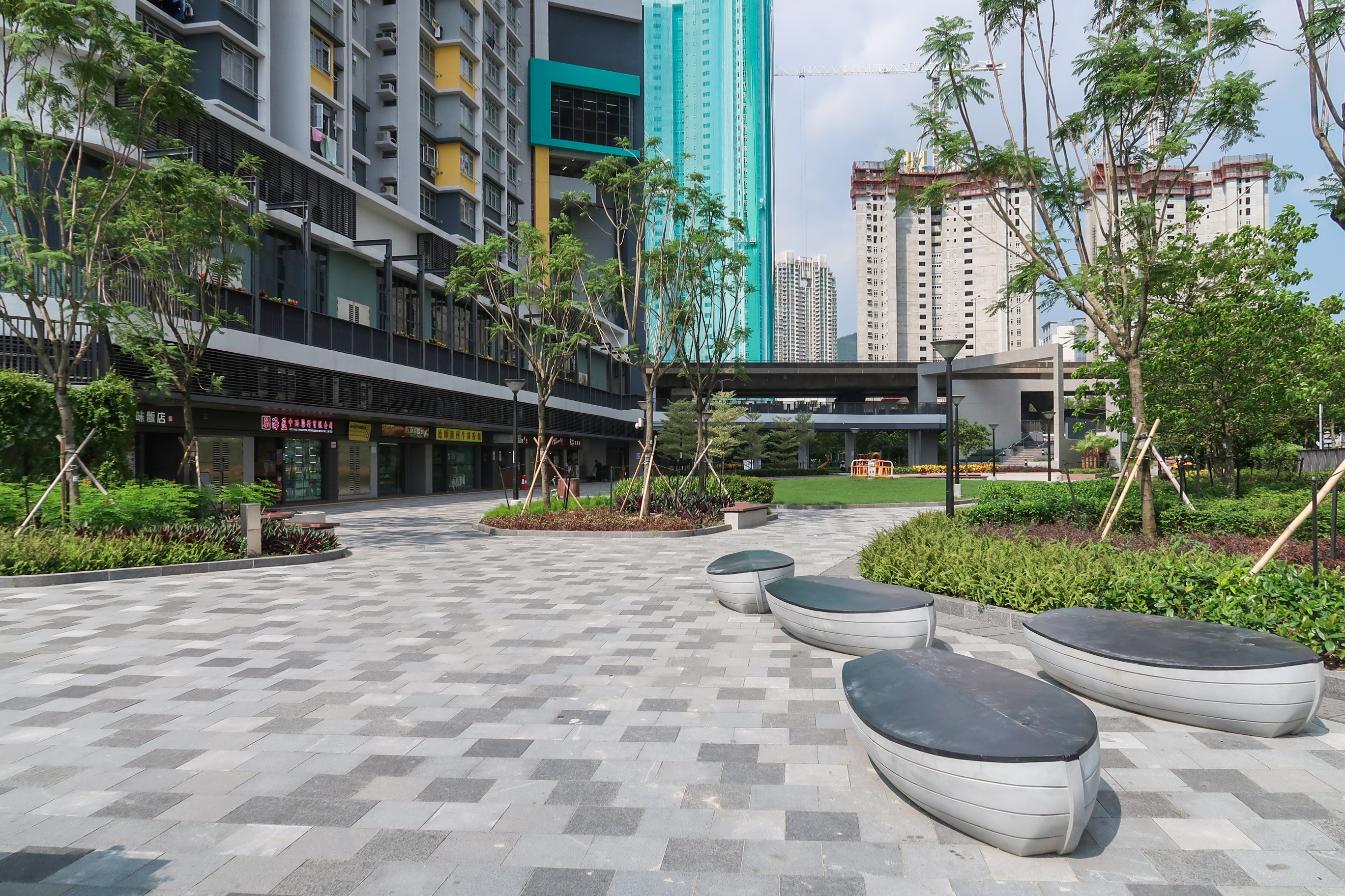 Hoi Ying Estate Open space